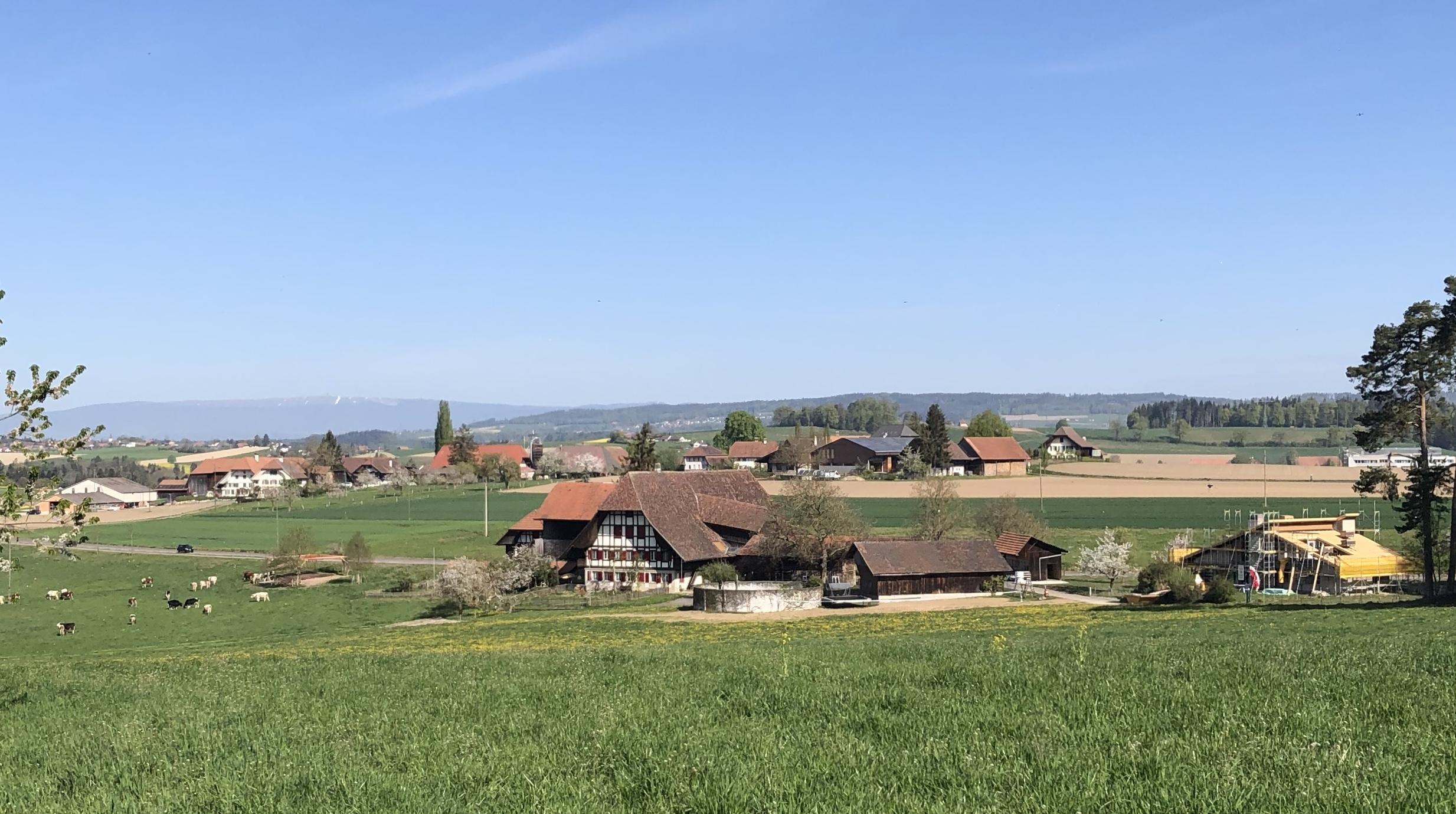 Blick auf Niederbottigen vom Rehhag